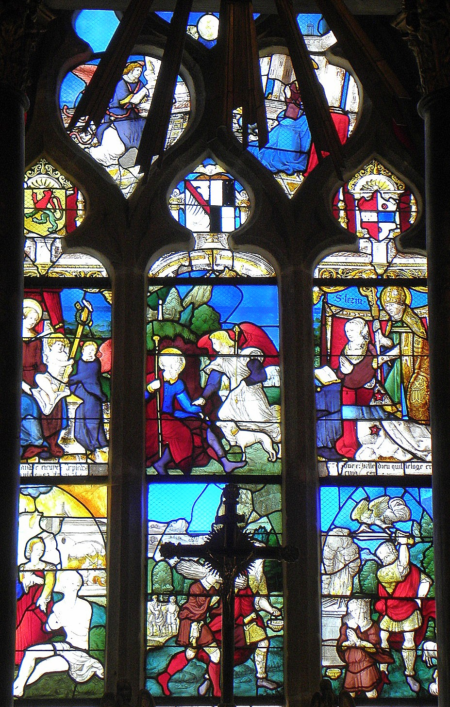 Baie 00 de l'église Saint-Lézin de La Chapelle-Janson (35).